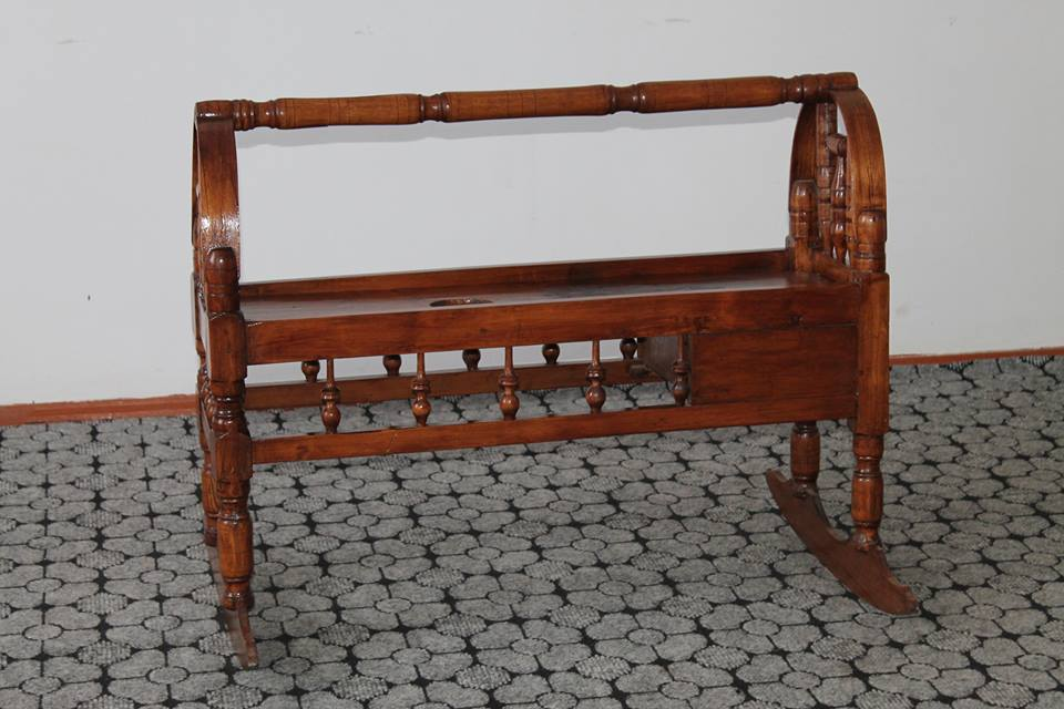 ჟიული შარტავას აკვანი